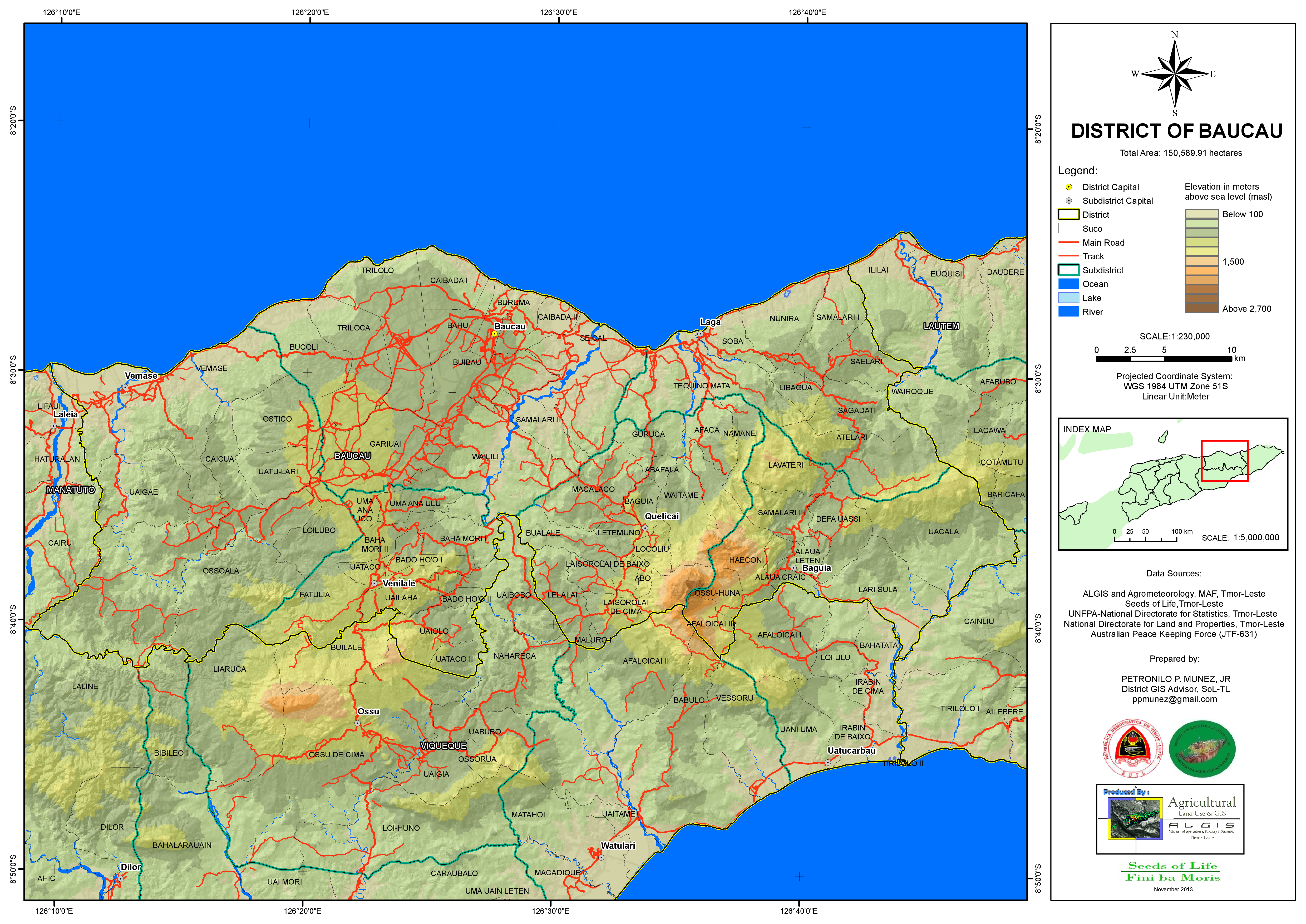 Distrikt Baucau